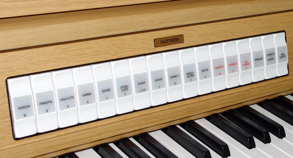 Das Bild zeigt einen Ausschnitt aus der Registerbank einer modernen digitalen Sakralorgel. Die Aufnahme stammt von meiner Johannus Opus 25.